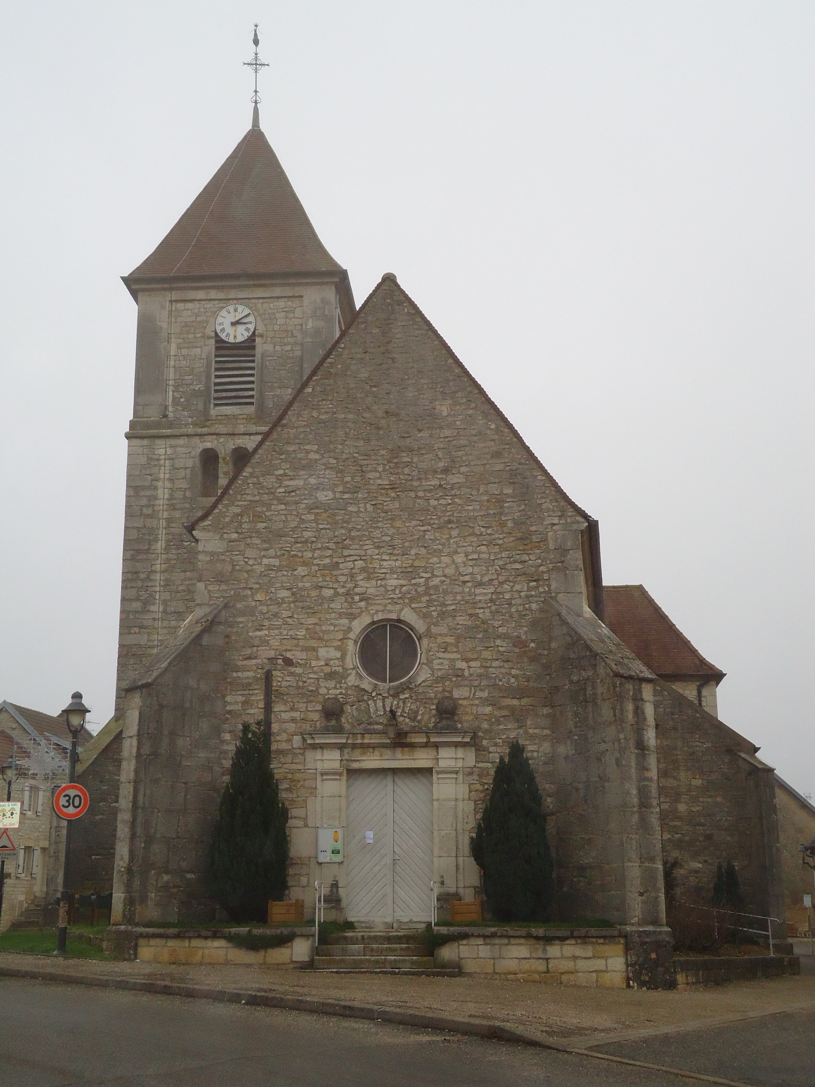 Eglise de Choisey